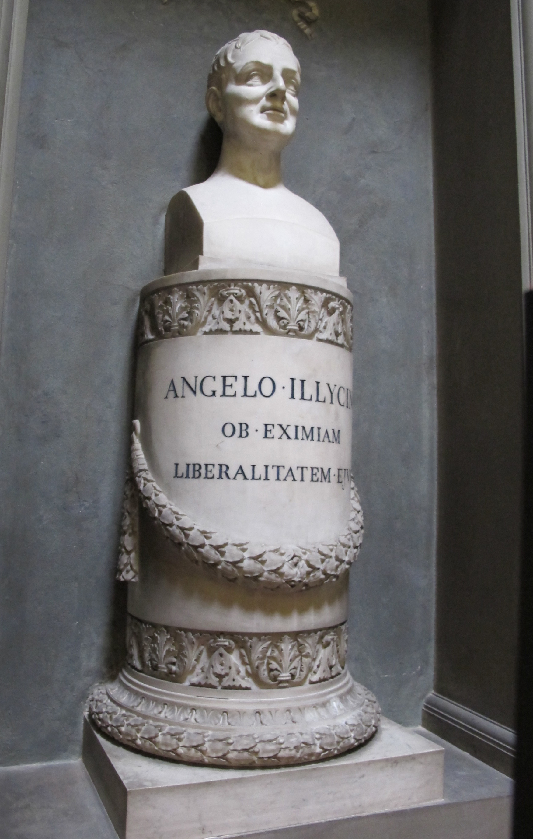 Biblioteca laurenziana, rotonda 06 busto